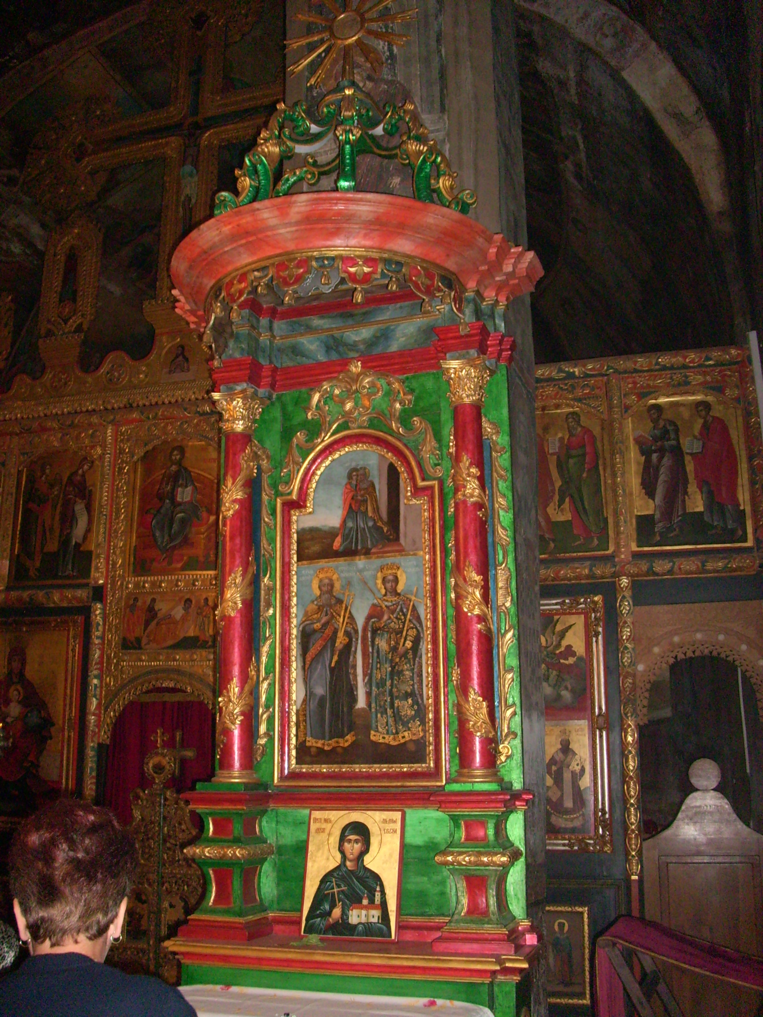 Манастир Крушедол; манастир Српске православне цркве на јужној страни Фрушке горе у Војводини.